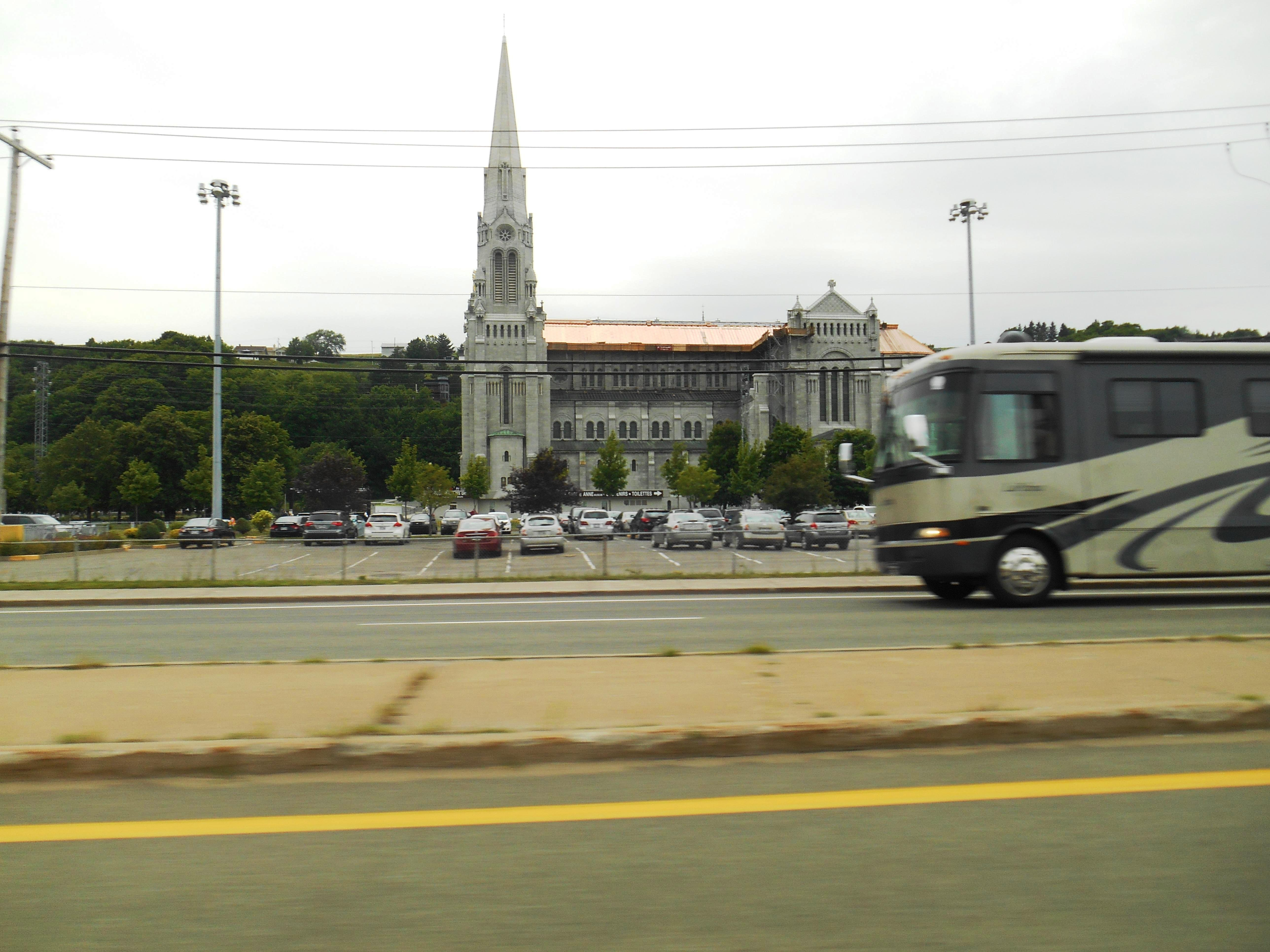 Sainte-Anne-de-Beaupré, vue du boulevard Sainte-Anne